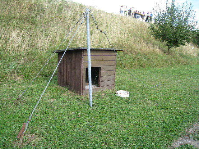 Hundelaufanlage, Grenzemuseum - Schlagsdorf.